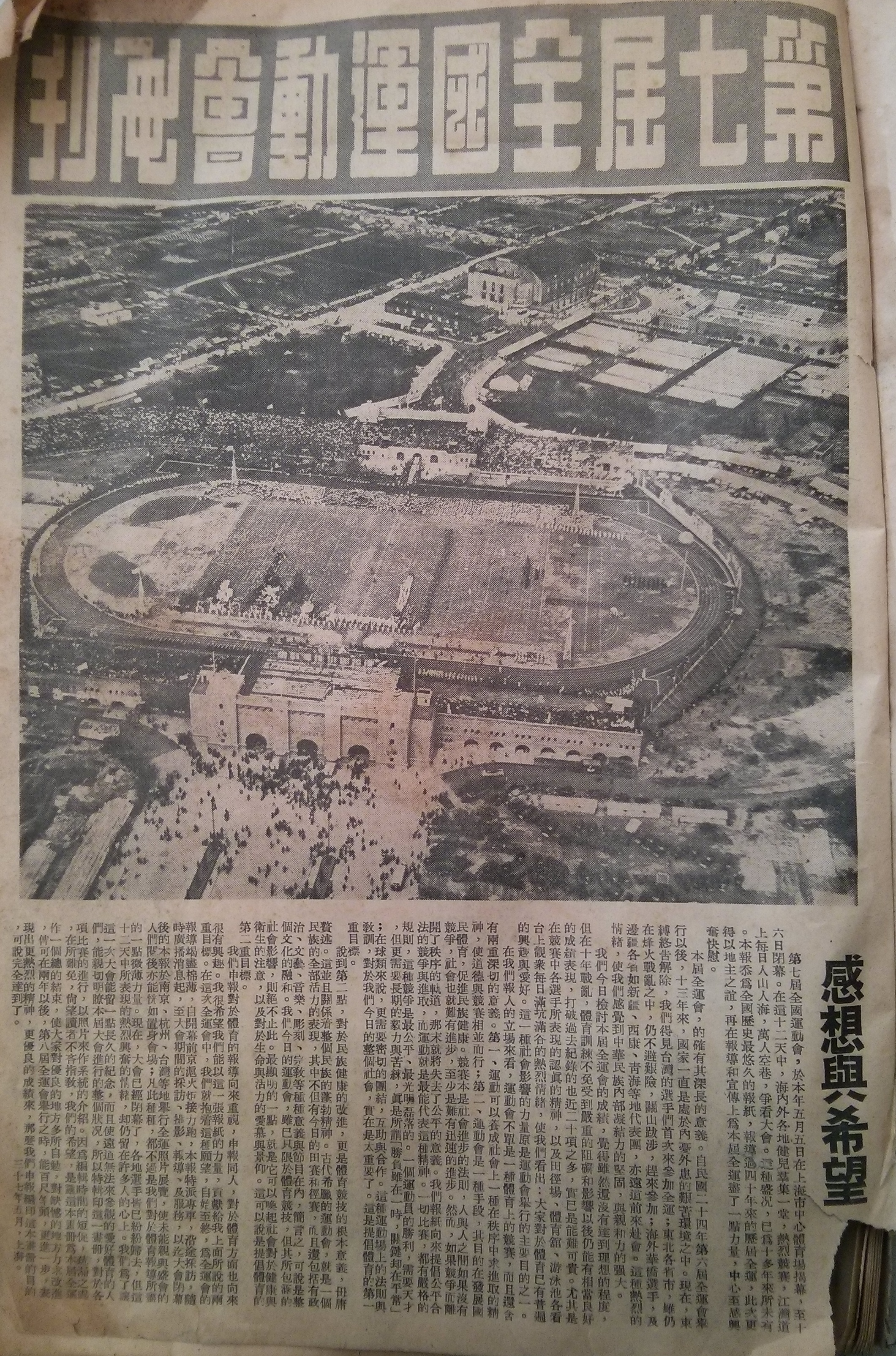 中文（台灣）: 中華民國第七屆全國運動會時期，申報館出版的《第七屆全國運動會畫刊》